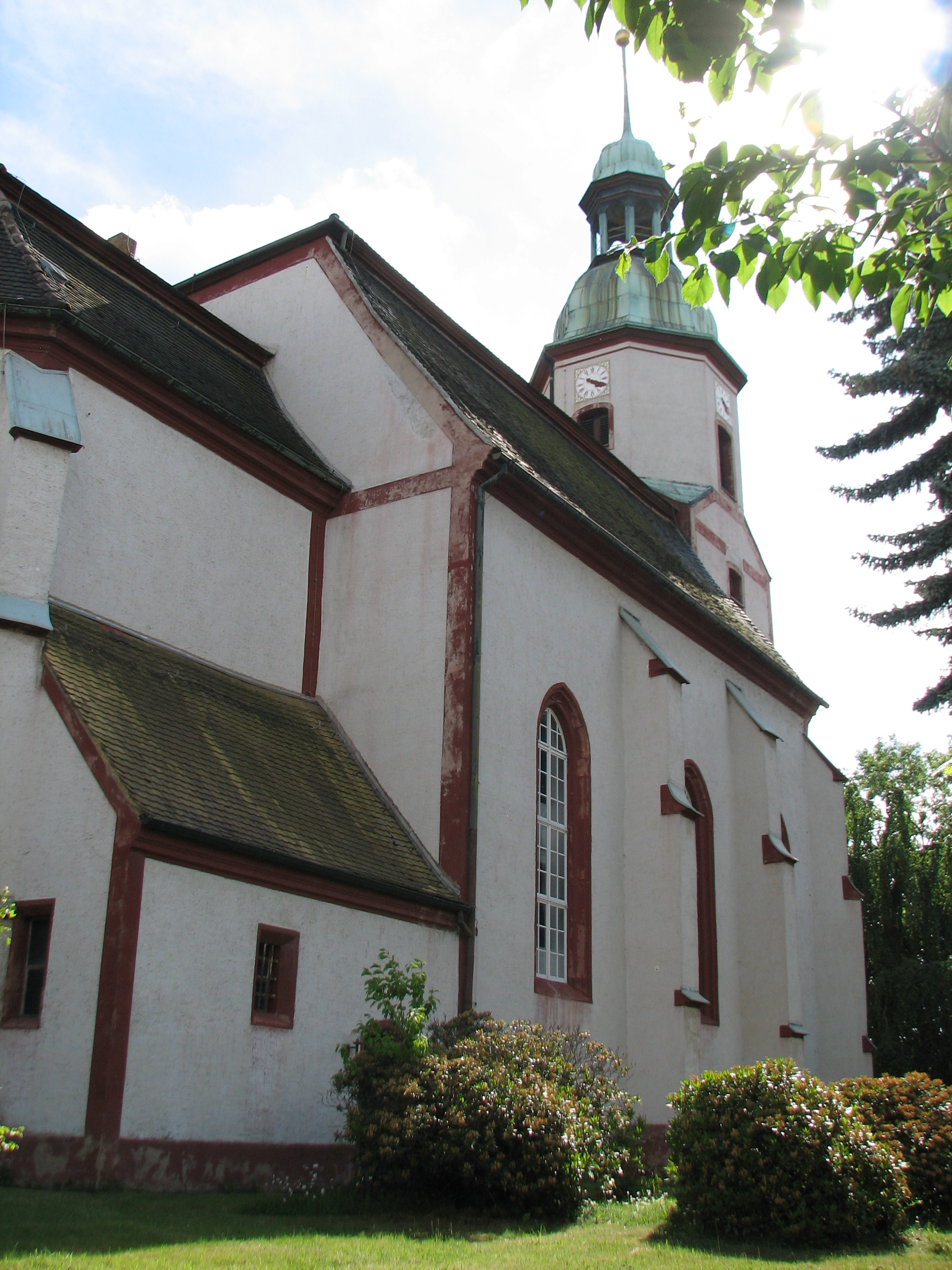 Naunhof-Kirche9